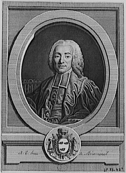 Portrait d'Armand Thomas Hue, marquis de Miromesnil (1723-1796)